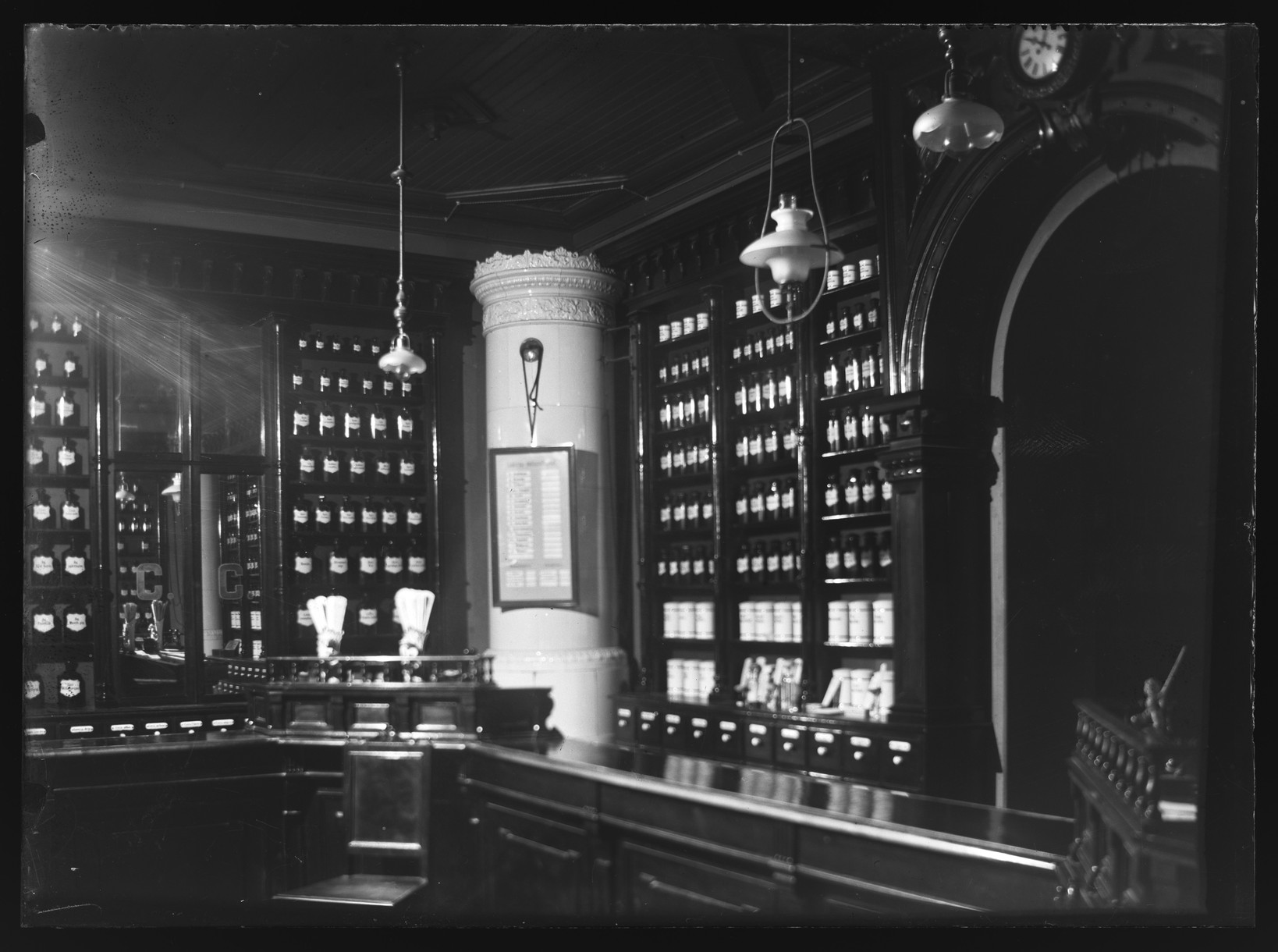 HS Ask 6.8.1 valokuvalasi, leveys 164 mm, korkeus 120 mm Asiasanat: valokuvat, Viipurin kolmas apteekki, Punaisenlähteentori, interiööri, myyntitiski, takana hyllystöt, apteekkipullorivistöt(runsaasti), kaakeliuuni, öljylamppu, sähkökattovalaisin(2), seinäkello Hugo Simbergin jäljillä - Kansallisgalleria, Hugo Simbergin arkisto